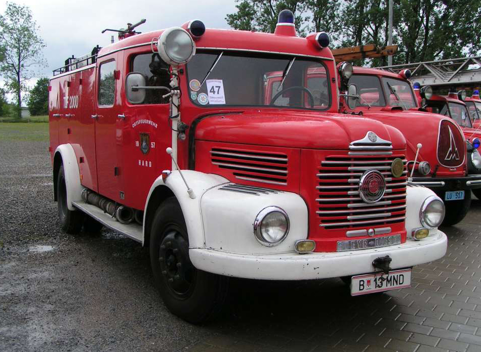 Steyr Feuerwehr-Oldtimer Quelle/Fotograf: Richard Bleichmann